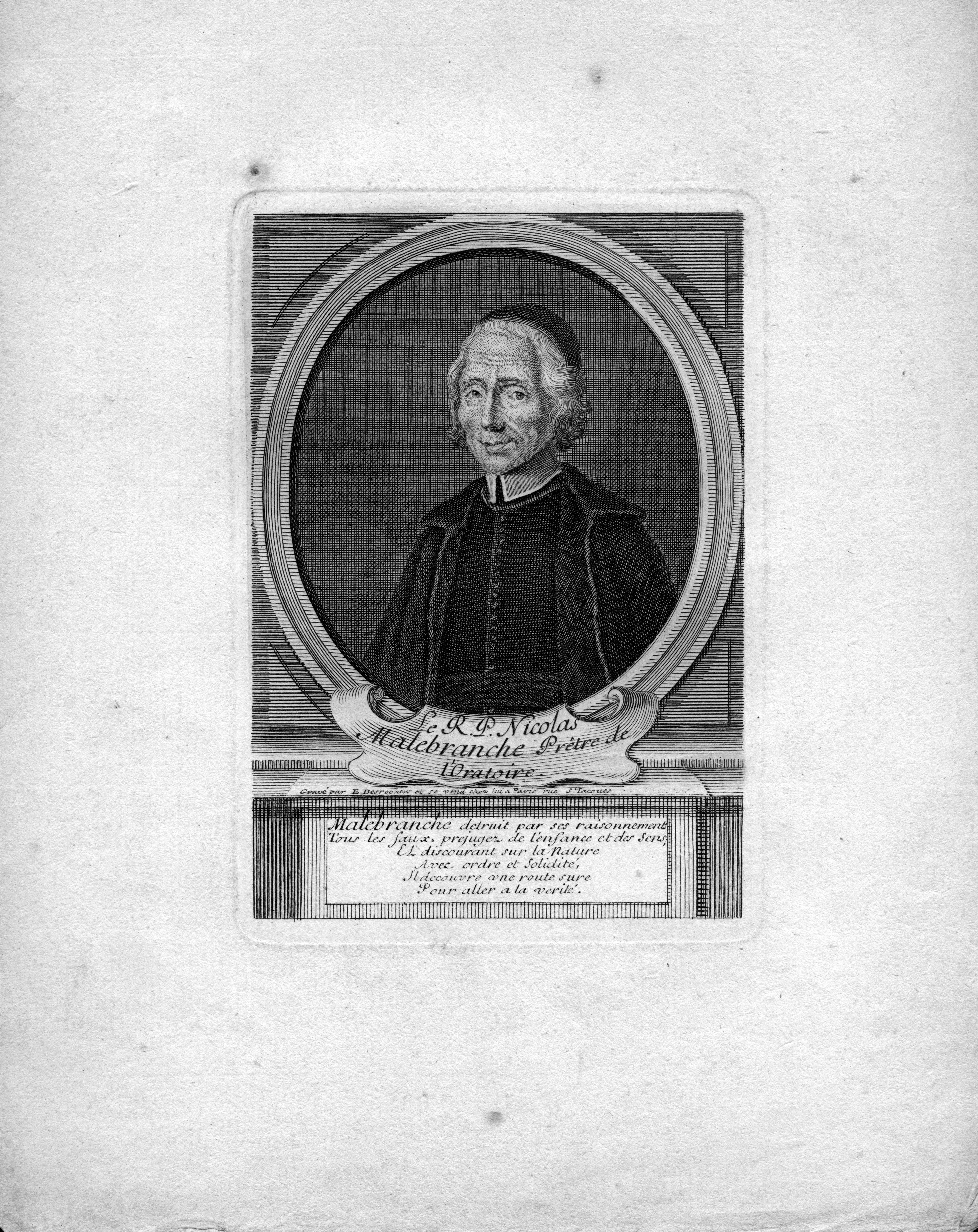 portrait gravé